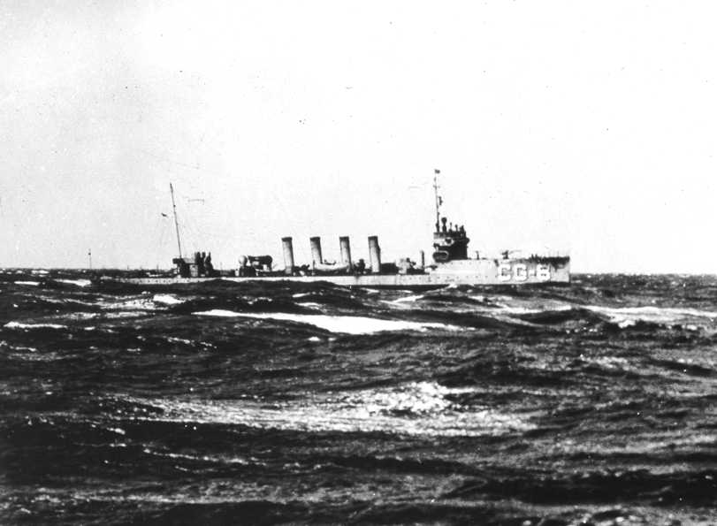 USS Ammen (DD-35)